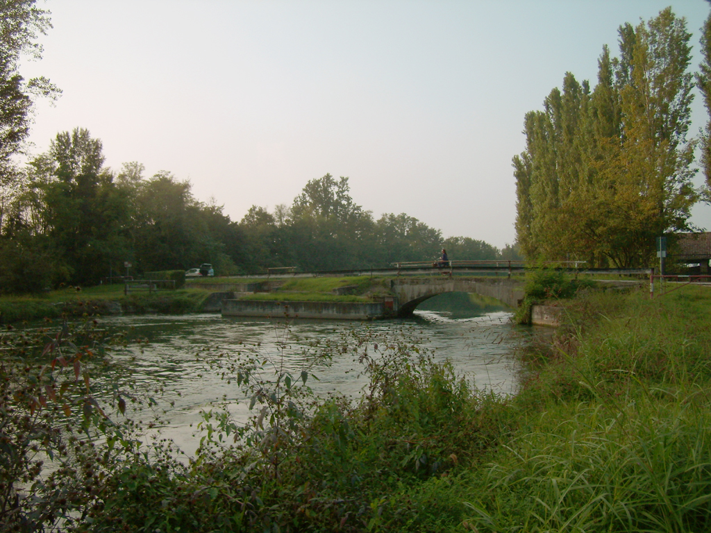 Il canale Muzza in località Muzzetta, fra Lodi e Lodi Vecchio.